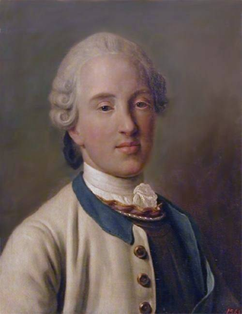 Ротари Пьетро Антонио. Портрет принца Саксонского,сына Августа II, в белом мундире с голубым воротником середина XVIII века. Музей-заповедник "ГАТЧИНА"